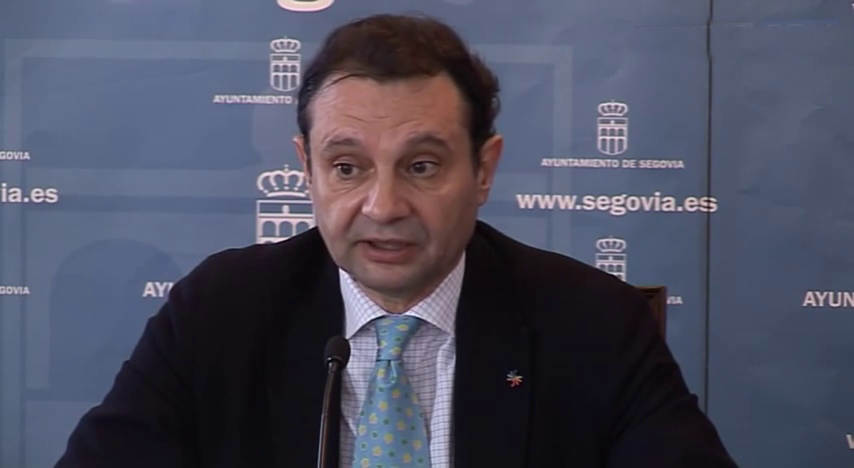 "Todos los créditos de los miembros del Consejo de Administración, de la Comisión de Control y de la Dirección deben pasar por el Consejo de Administración. Y yo no lo recuerdo. No tengo la información. Quien la tiene, podrá confirmarlo o desmentirlo. Yo me fui por el oscurantismo", ha sido la respuesta del alcalde de Segovia, Pedro Arahuetes, al ser preguntado por su opinión sobre la ocultación a la CNMV de los créditos millonarios concedidos a consejeros de Caja Segovia y familiares del ex presidente Atilano Soto, desvelada este miércoles por UPyD.